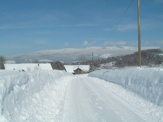 Dreisesselberg im Winter